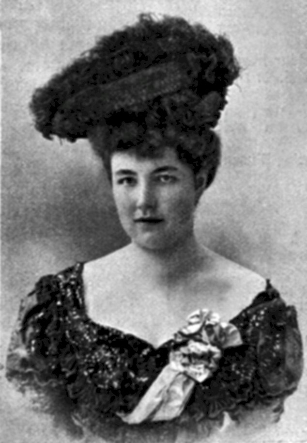 Erika Freiin Pacher von Theinburg 1903, Gattin des Fhr. Egon von Waldstätten